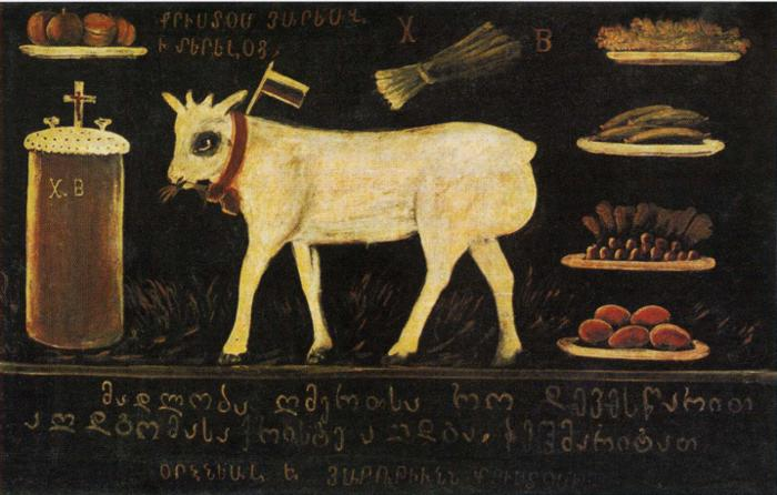 «Пасхальный ягнёнок», Нико Пиросмани, 1905, Государственный музей искусств Грузии в Тбилиси